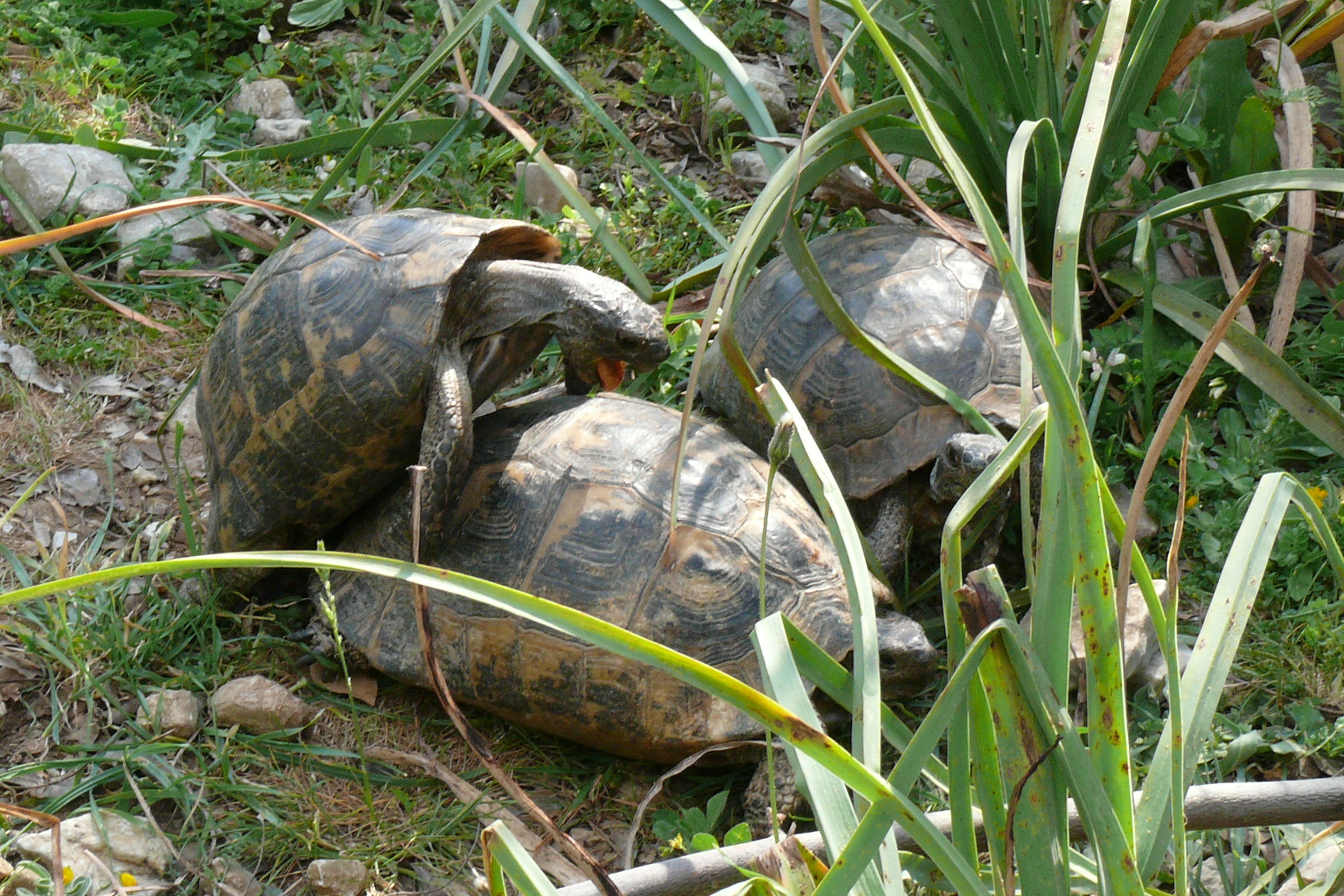 Paarung, Maurische Landschildkröten (Testudo graeca) am Rand des Lykischen Wegs